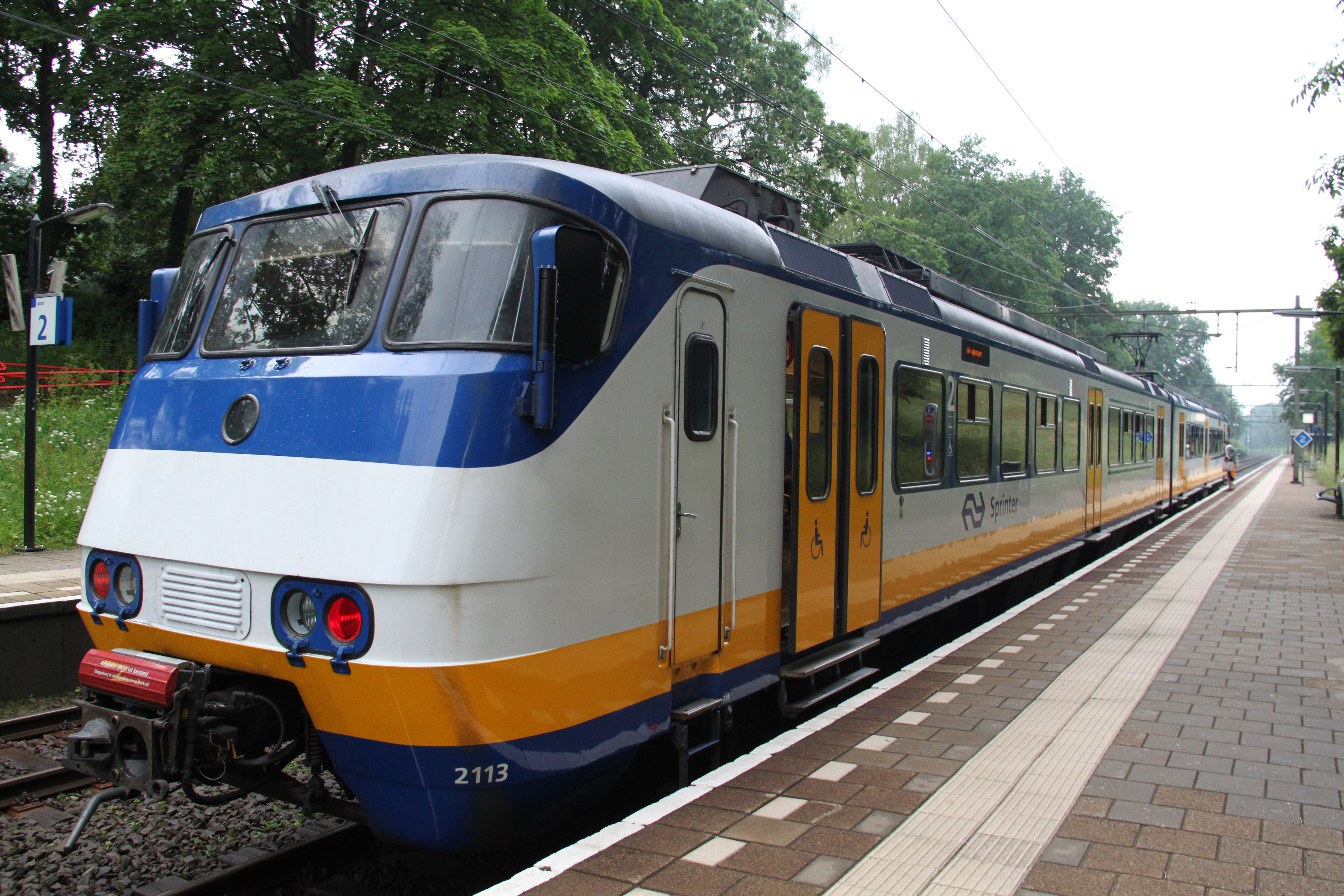 Een SGMm komt binnen in station Oosterbeek in 2012.